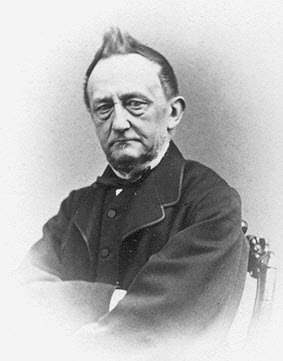 Portretfoto van Gerard Dumbar (1815-1878)